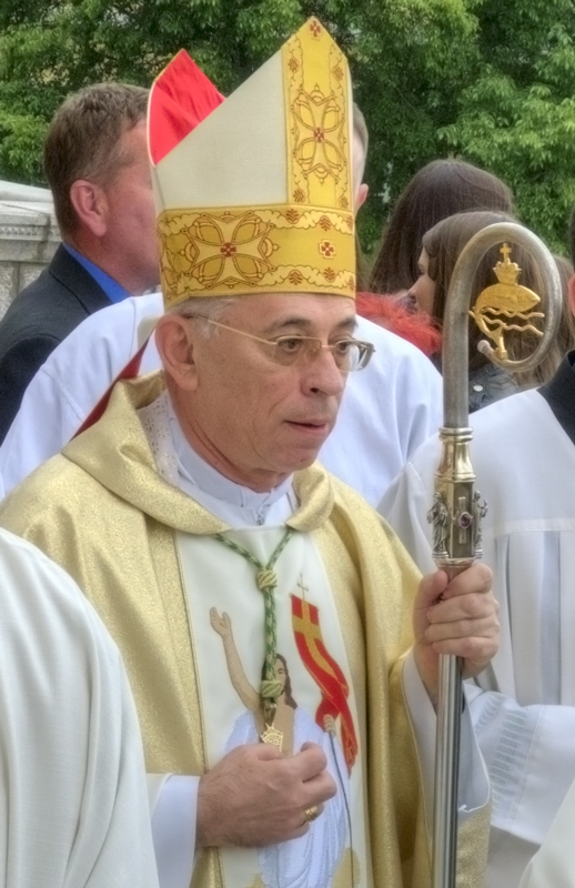 Obred svete potvrde u Kapucinskoj crkvi Gospe Lurdske u Rijeci